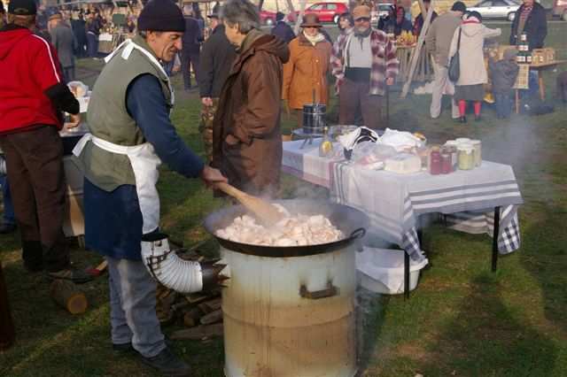 Čvarakfest, Karanac